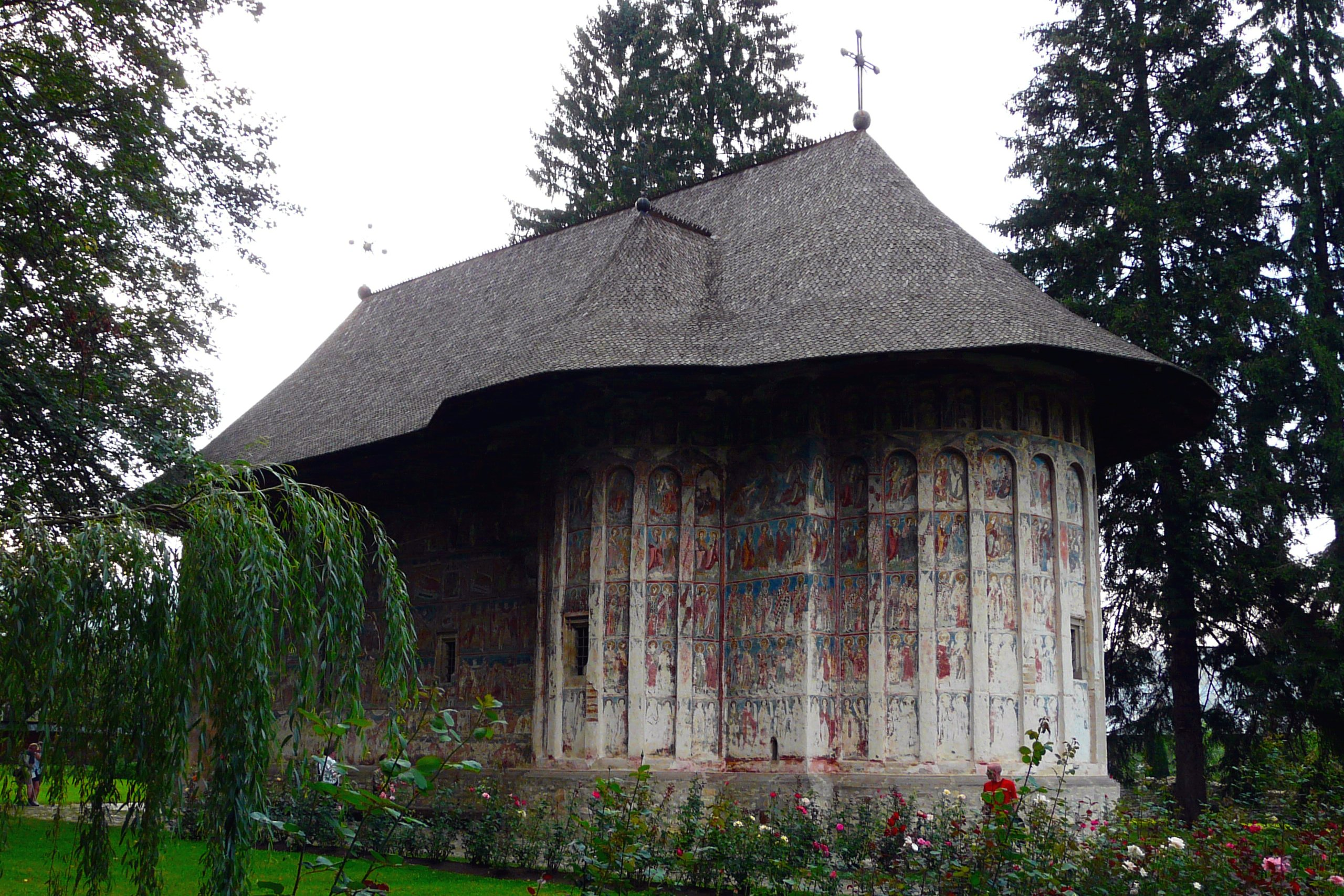 extérieur de l'église du monastère de Humor Roumanie